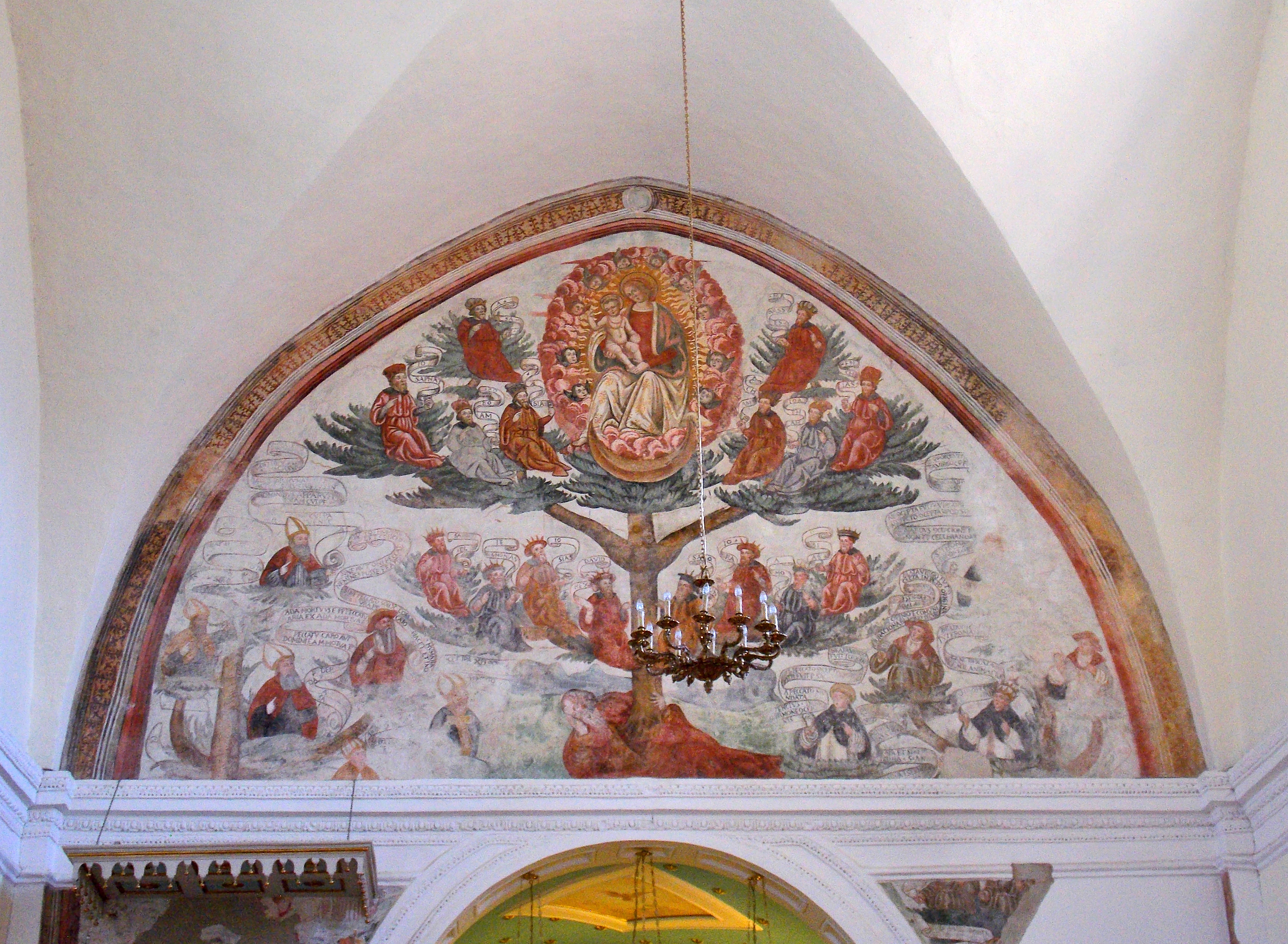 Il santuario della Madonna del Taburno a Bucciano (BN)